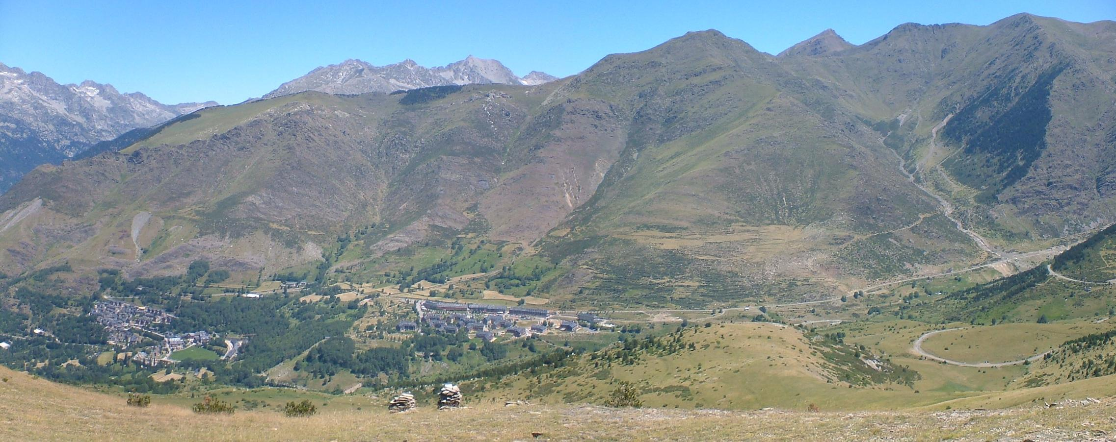 Serres de Llats i de Casesnoves vistes des del Tossal de la Llobarçana; la Vall de Boí, Alta Ribagorça, Catalunya